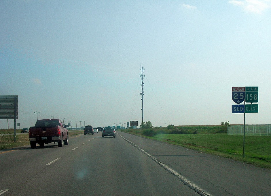 Vue sur l'autoroute 25 en chevauchement avec la route 158, à Saint-Esprit (région de Lanaudière), Québec, Canada.